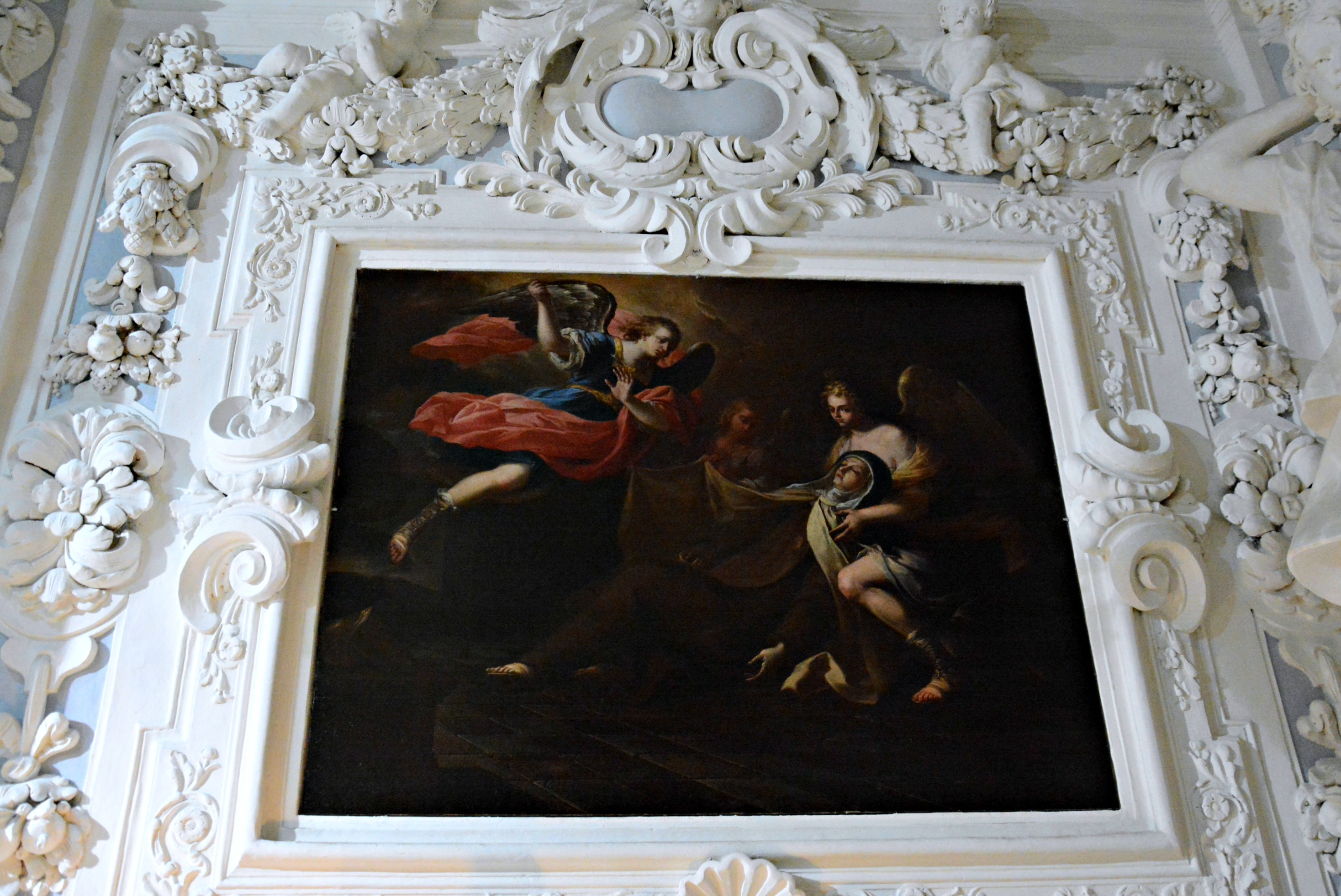 Vedi titolo